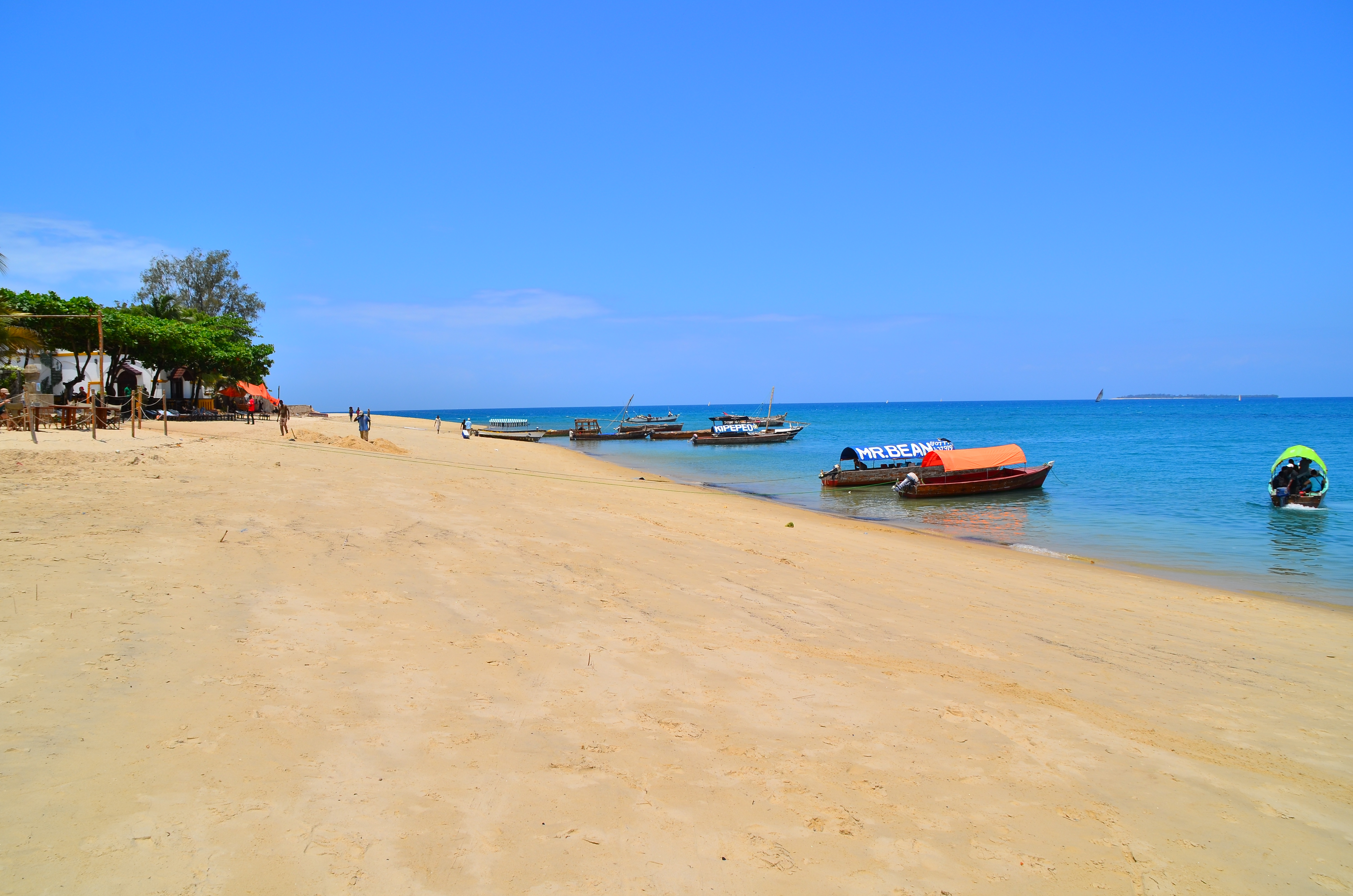 Safari por Kenia